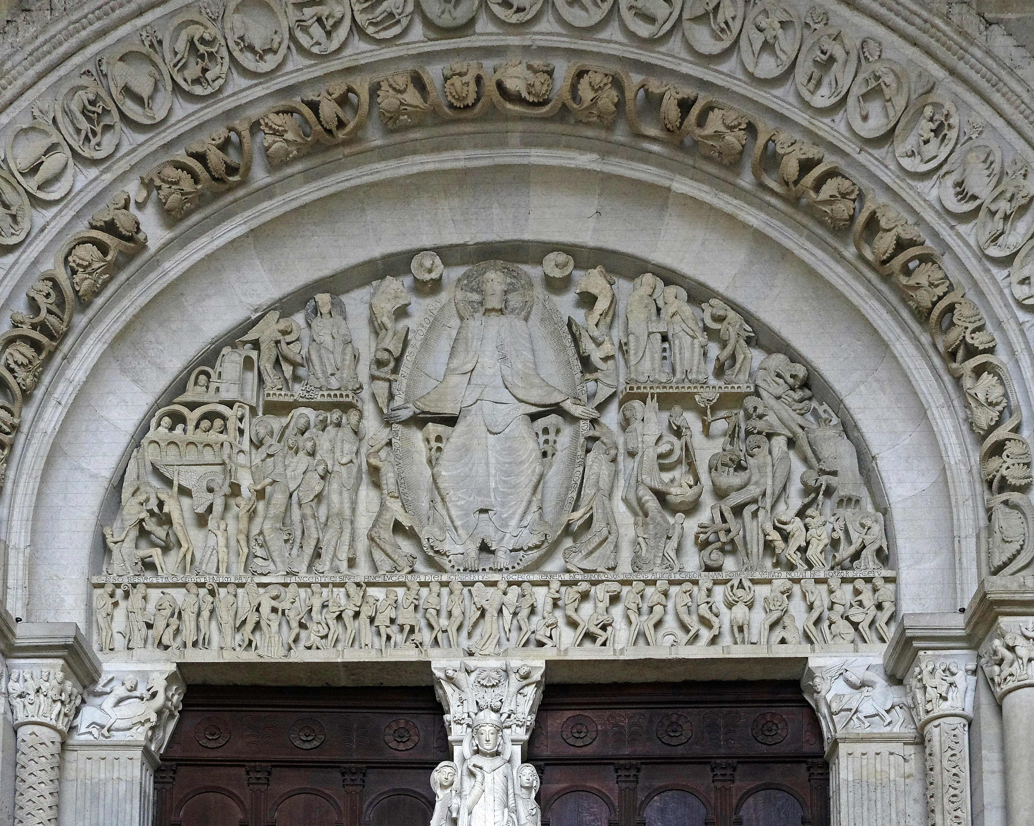 Autun (Saône-et-Loire) Cathédrale Saint-Lazare, tympan du portail central. Œuvre d'un certain Maître Gilbert (Gislbertus) qui signe aux pieds du Christ (Gyslebertus hoc fecit). Le tympan a été achevé vers 1130 et restaurée en 2009. L'art roman étant peu apprécié au XVIIIe siècle, les chanoines du chapitre de la cathédrale firent plâtrer le tympan en 1766, ce qui contribua probablement à sa protection. Protégé sous sa carapace de plâtre, le tympan fut redécouvert au XIXe siècle, en 1837. La tête du Christ fut retrouvée au musée Rolin et réinstallée en 1948. Au milieu, le Christ-juge, en majesté dans une mandorle, sépare le paradis de l'enfer. À gauche, le paradis, les élus, reçus par saint Pierre à la porte du paradis, se hissent avec l'aide des anges dans la Jérusalem céleste représentée comme un palais aérien avec des arcades en plein cintre de type roman. À droite, l'enfer, le diable tente de faire pencher la balance de son côté, mais Saint Michel s'y oppose.